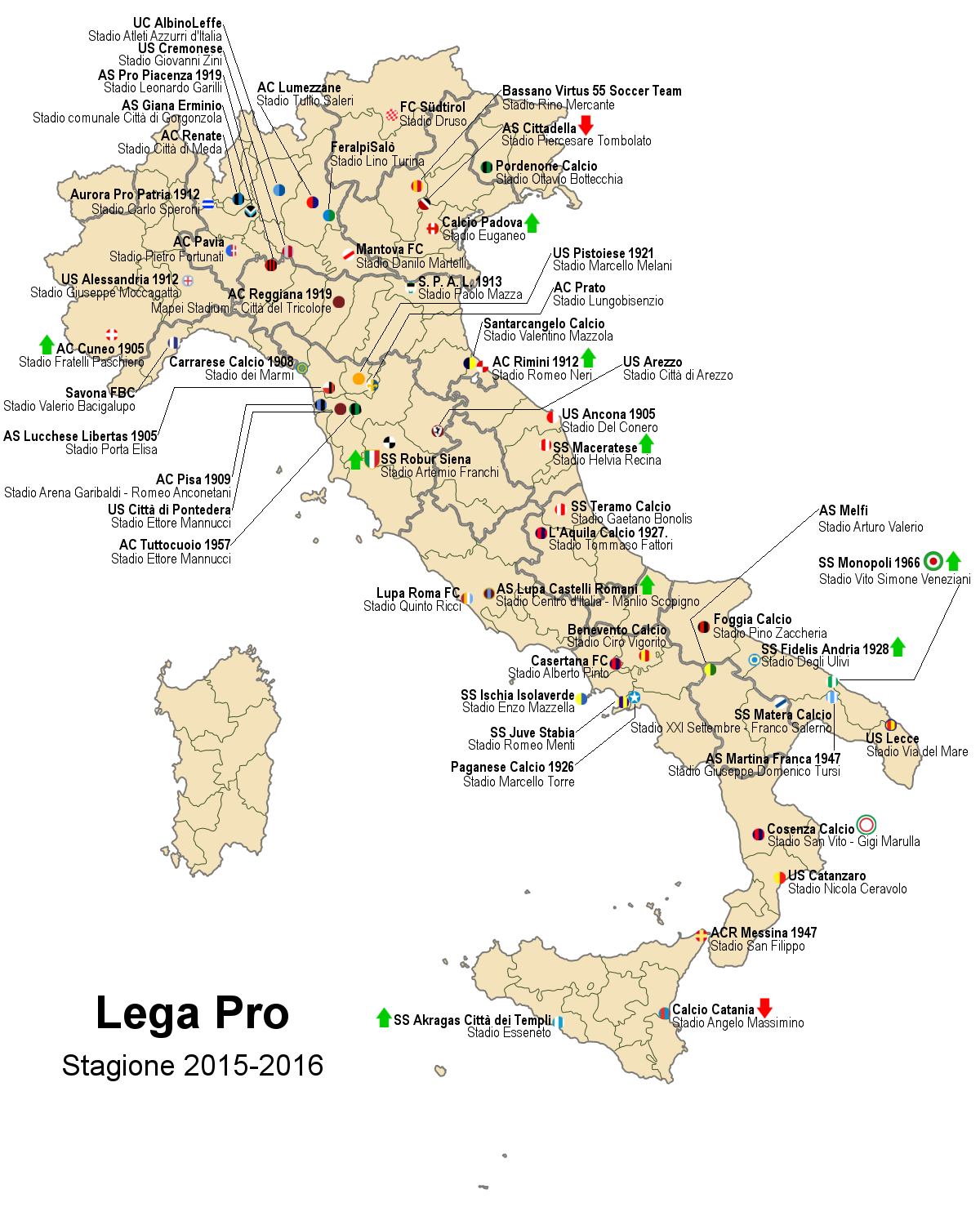 Collocazione delle squadre della Lega Pro 2015-16